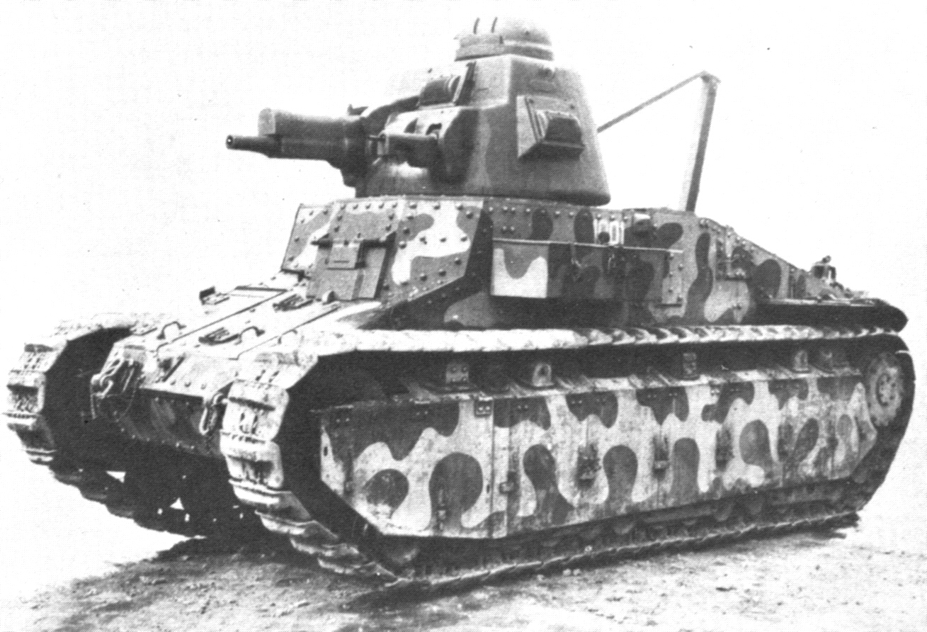 Digitale reproductie foto van de Char D1 tank